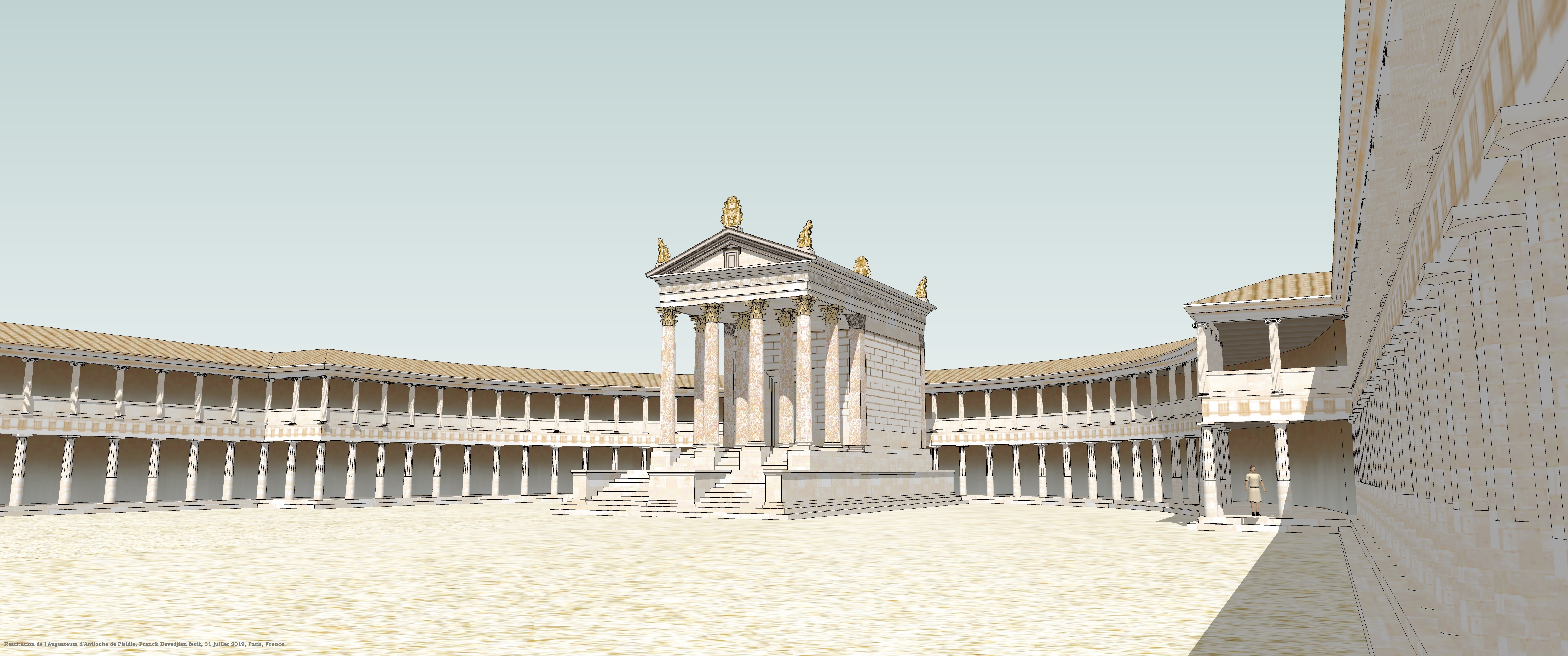 Restitution de l'Augusteum, vue depuis le rez-de-chaussée.